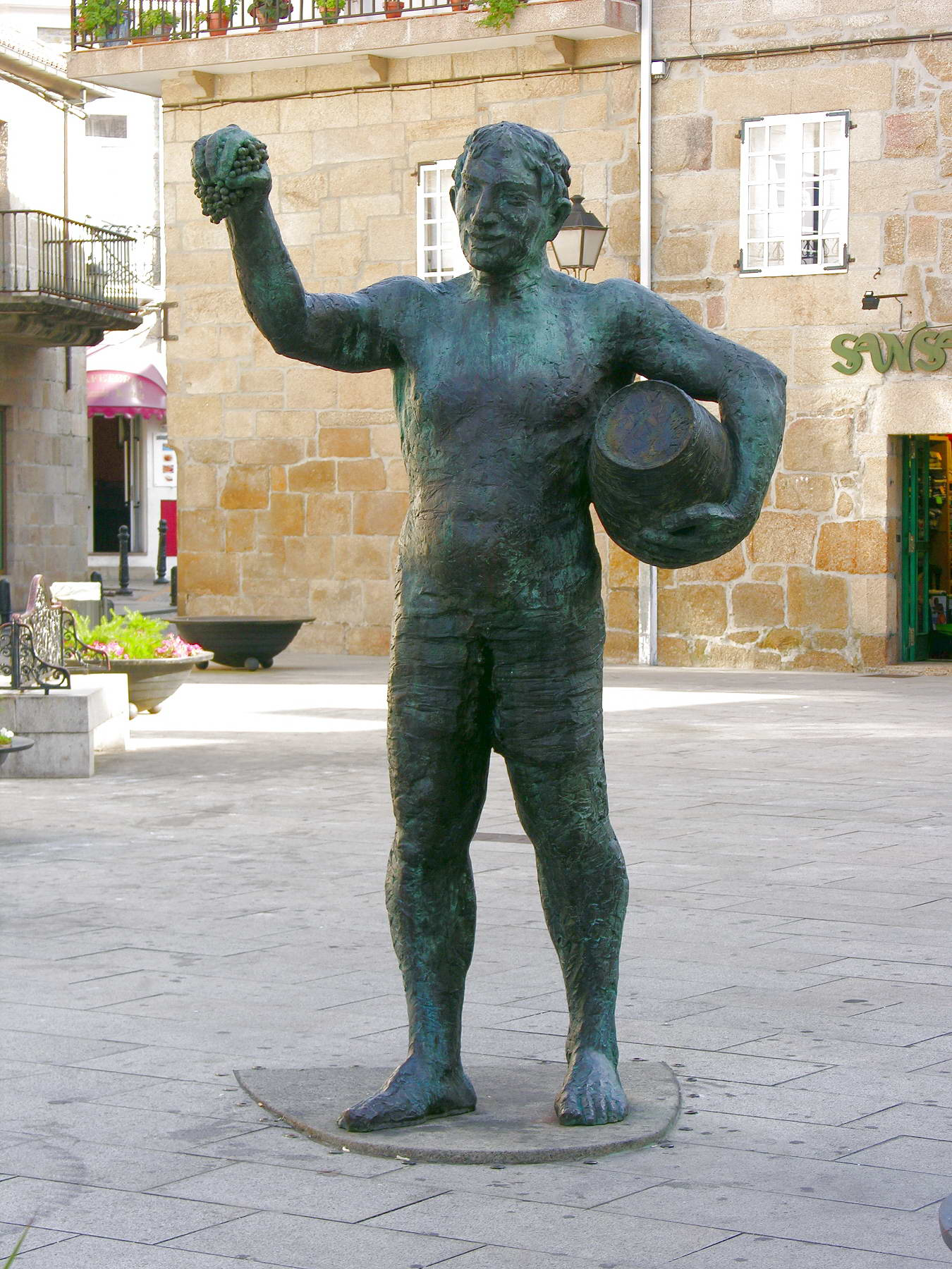 Cambados, Galicia, España Publish by= Luis Miguel Bugallo Sánchez. Self made.